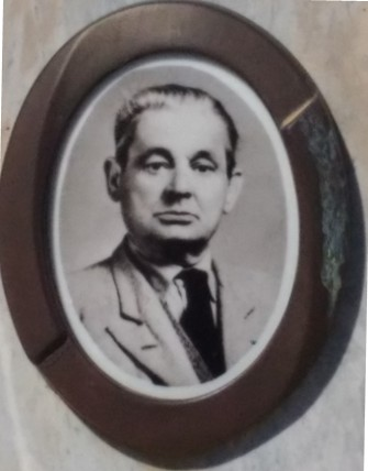 Cannone, critico letterario, giornalista e anarchico italiano